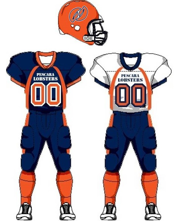 Divise delle Pescara Lobsters